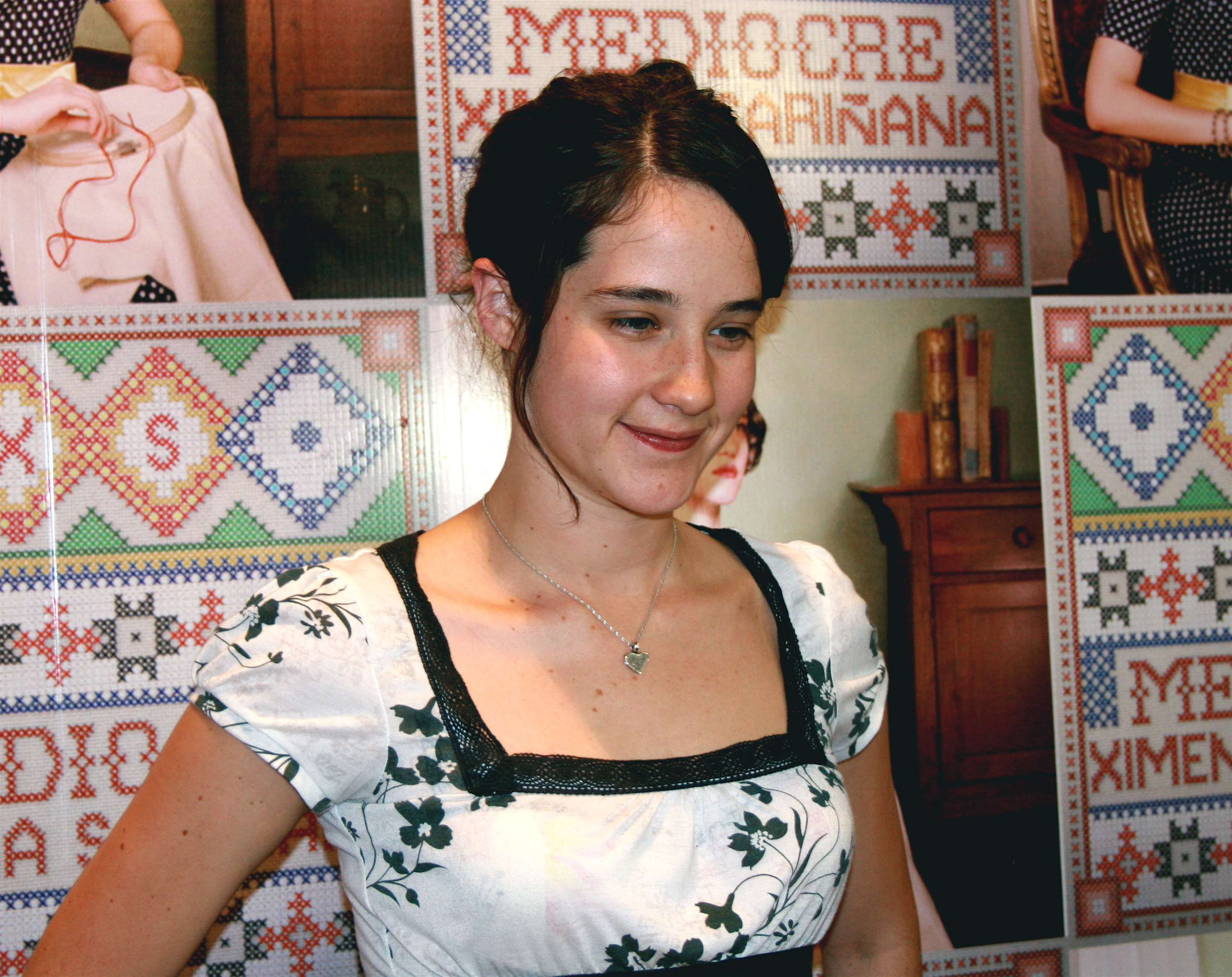 Mix Up Plaza Loreto